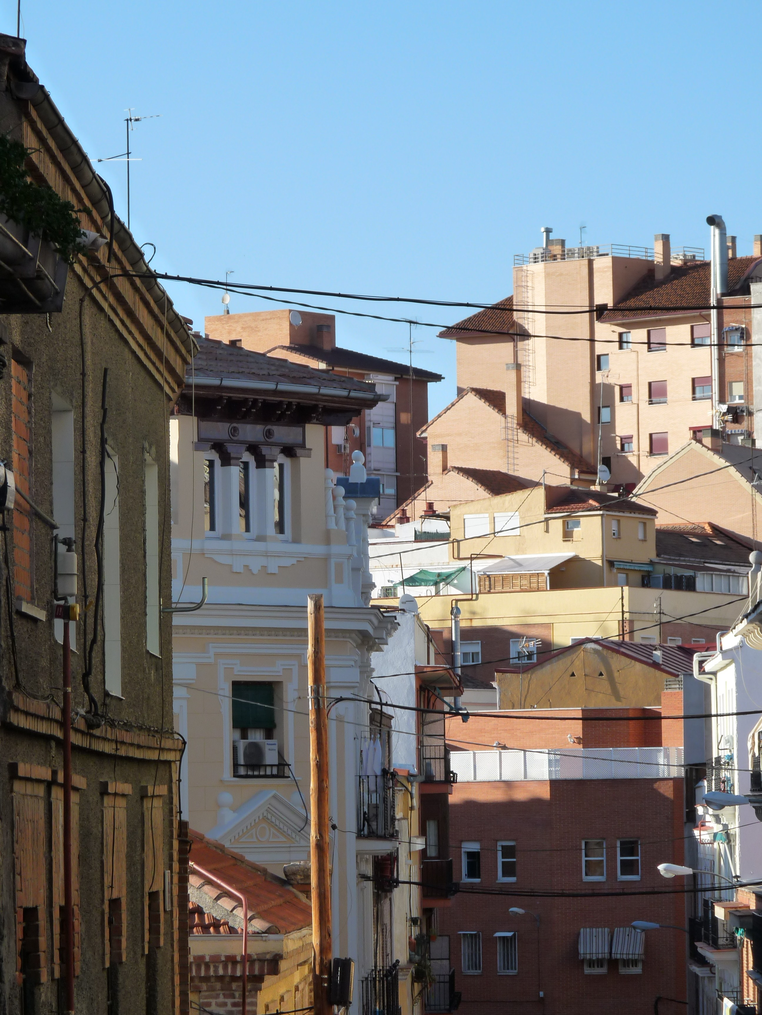 Calle Tenerife, esquina calle San Raimundo, Madrid, España.